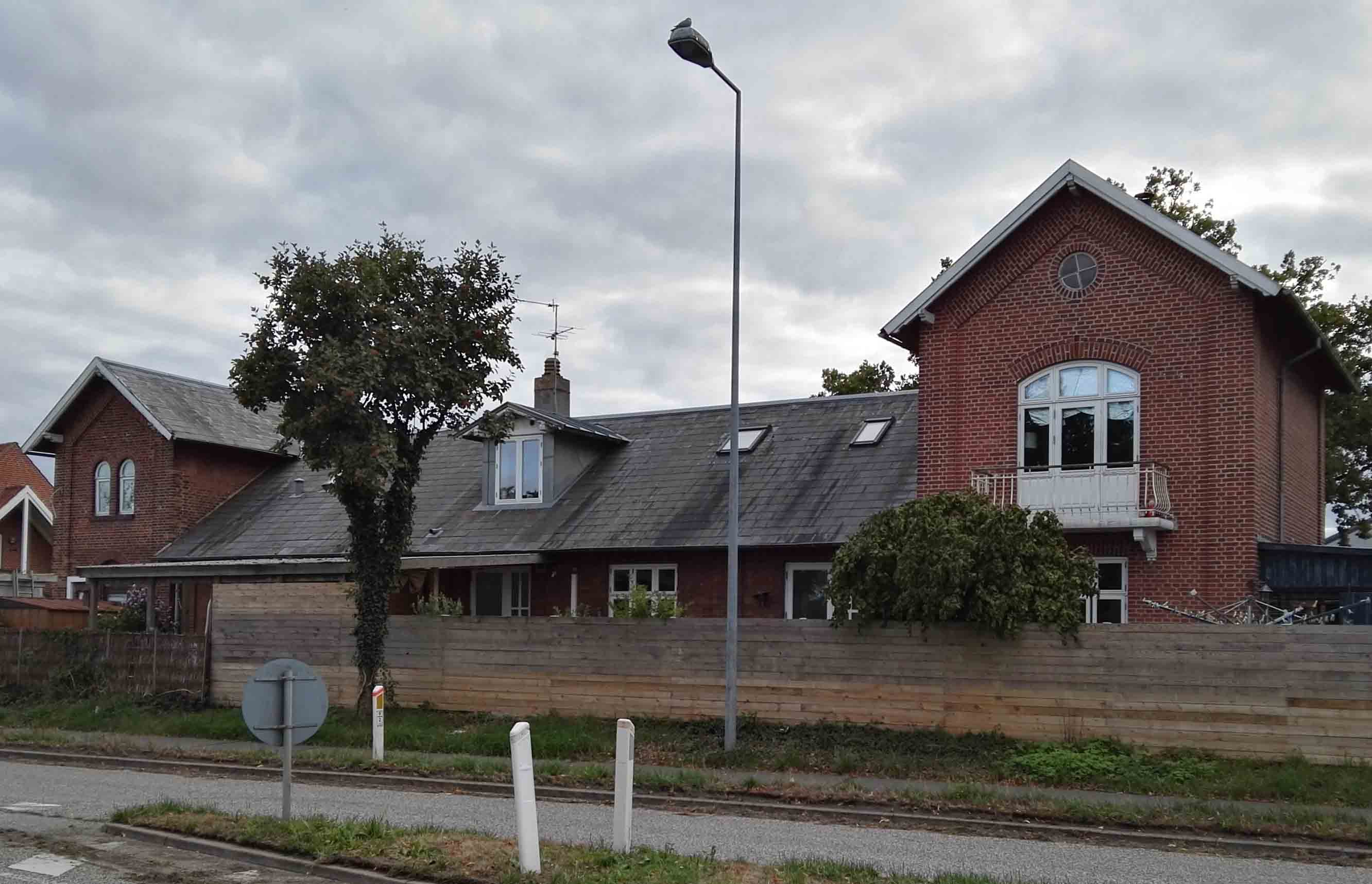 Hov Station fra sporsiden